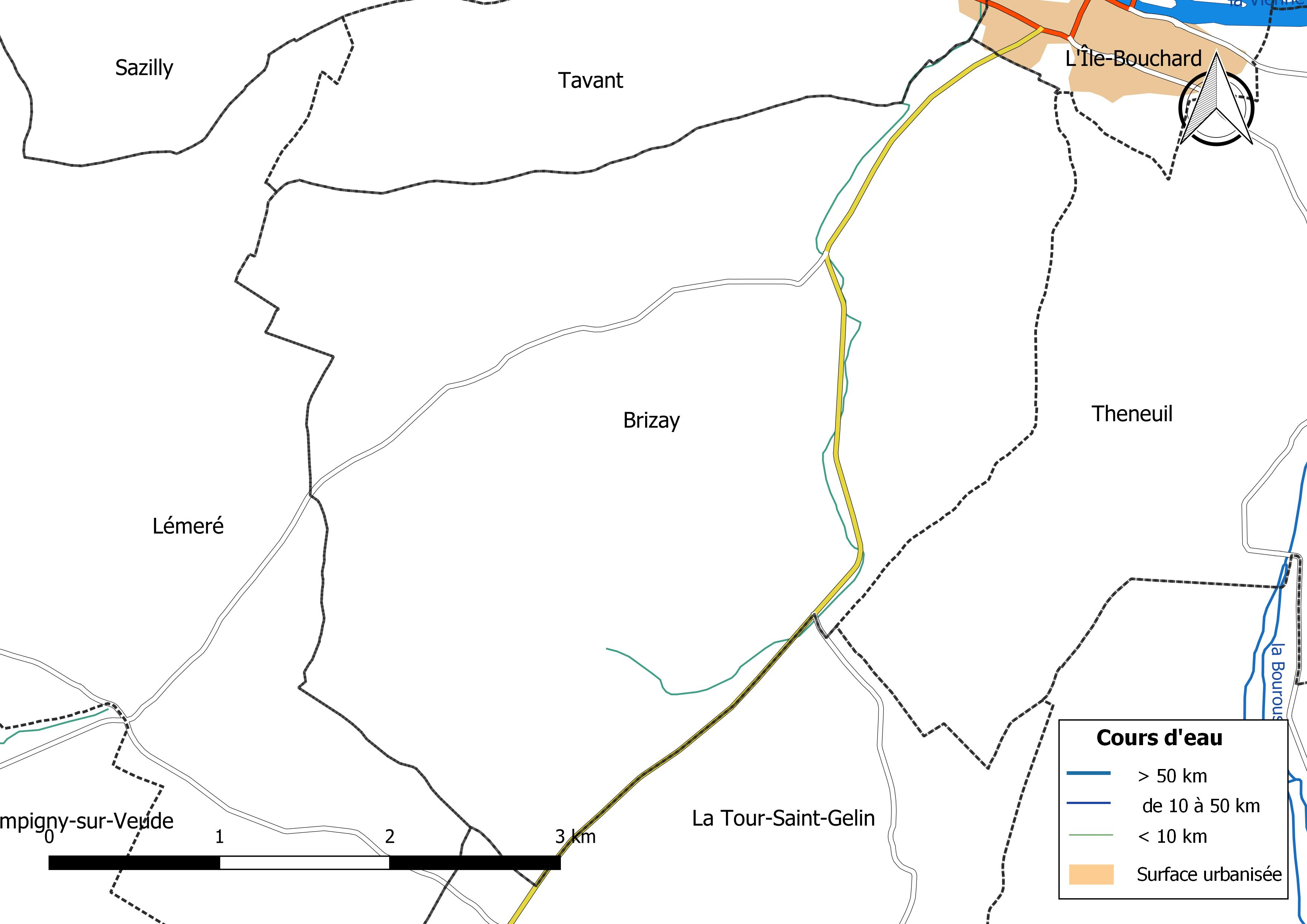 Carte du réseau hydrographique de la commune de Brizay (France).